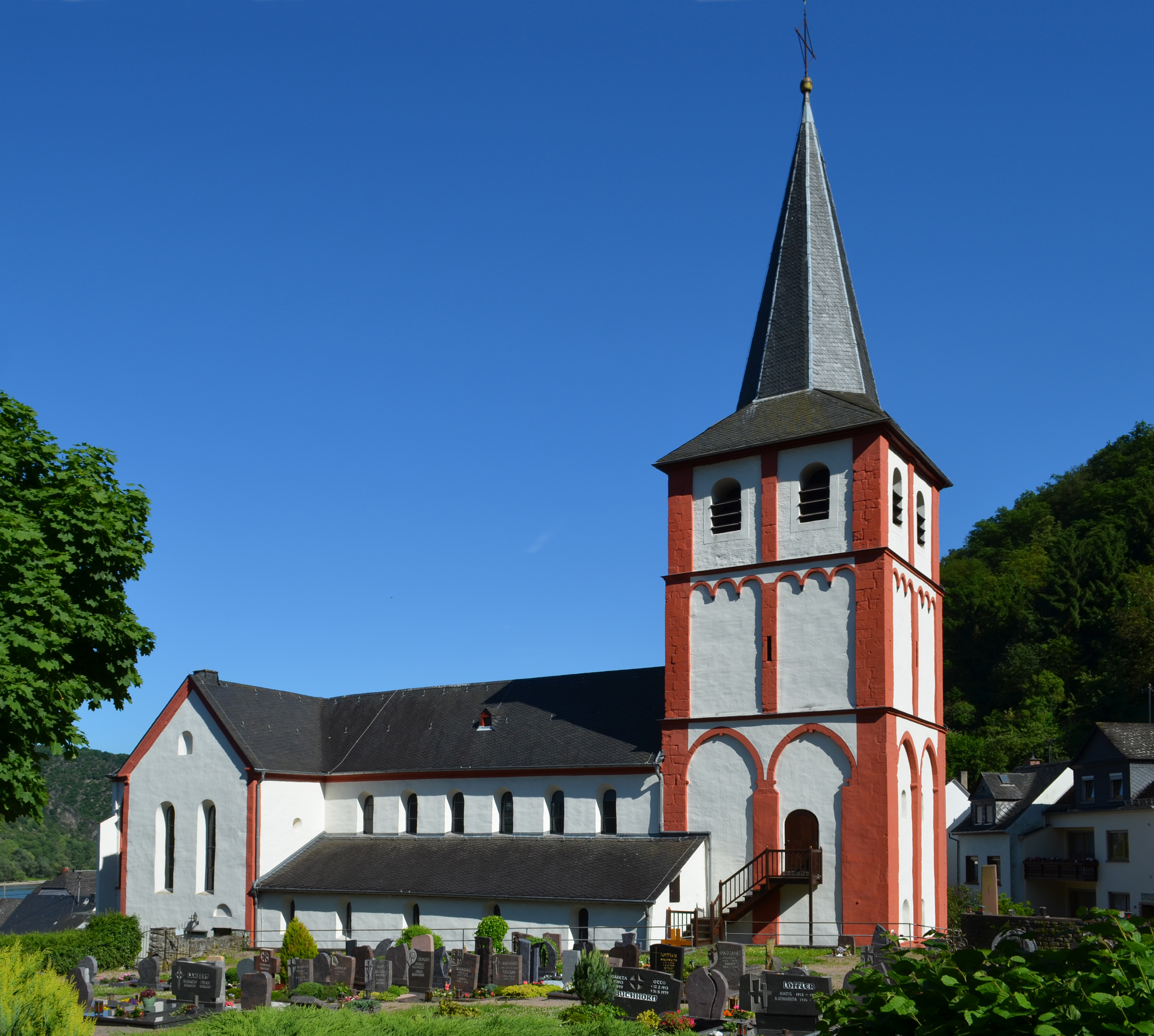 Nordwestansicht der Kirche St. Bartholomäus in Boppard-Hirzenach This image was created with Hugin